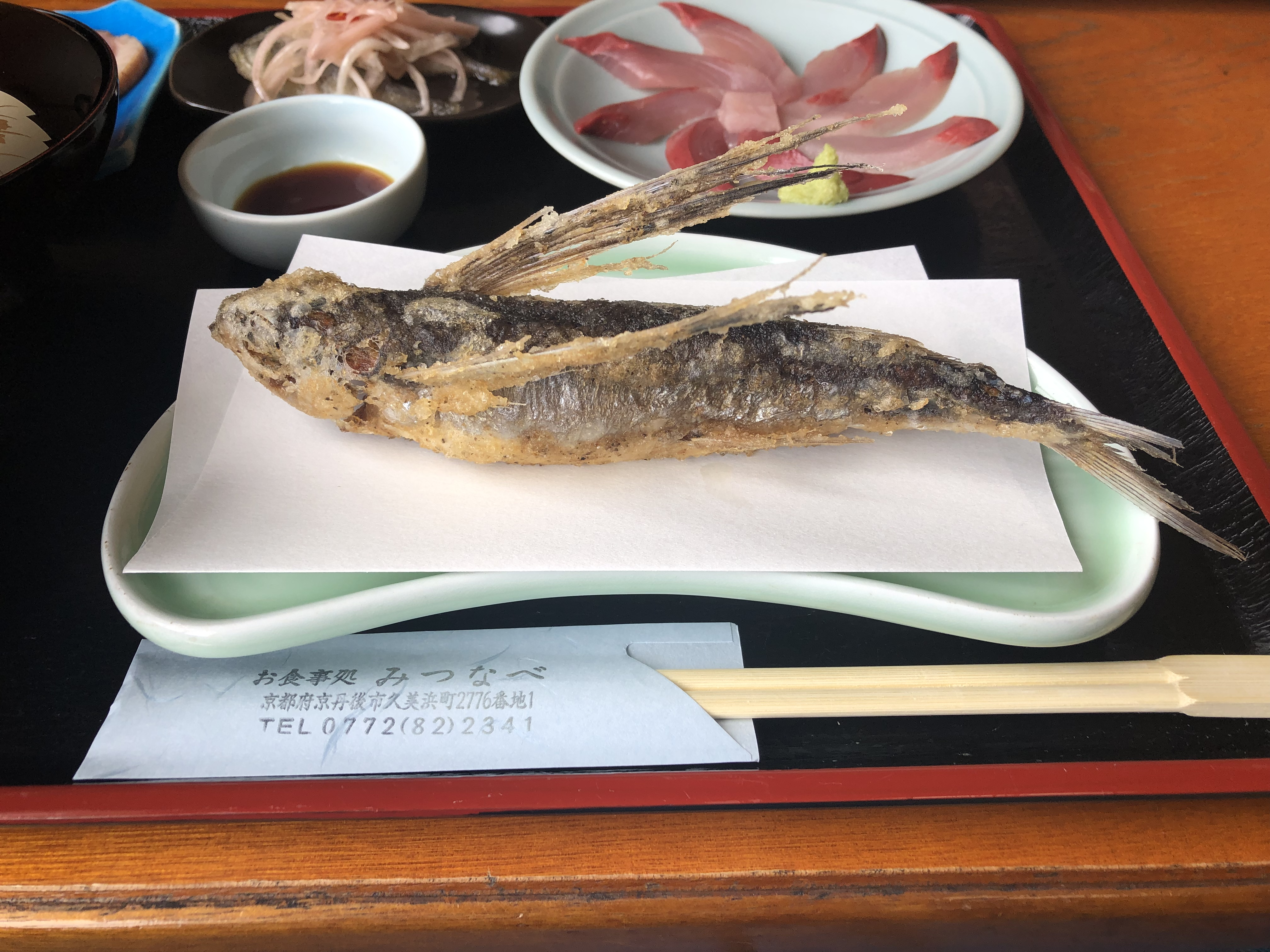 トビウオの姿揚げ(唐揚げ) 、京丹後市の海鮮料理店にて撮影